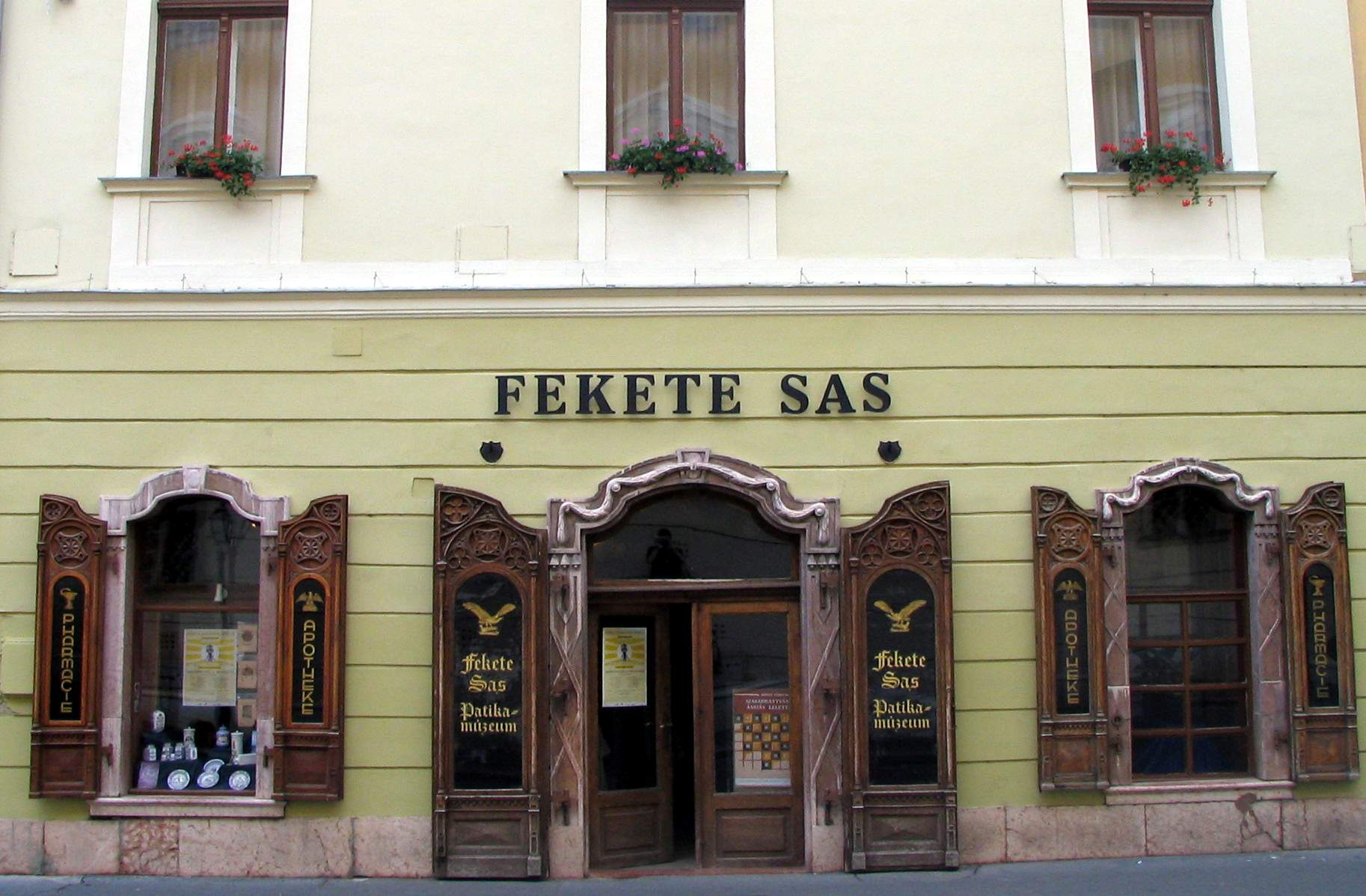 Black Eagle. Museum in Székesfehérvár (Hungary)